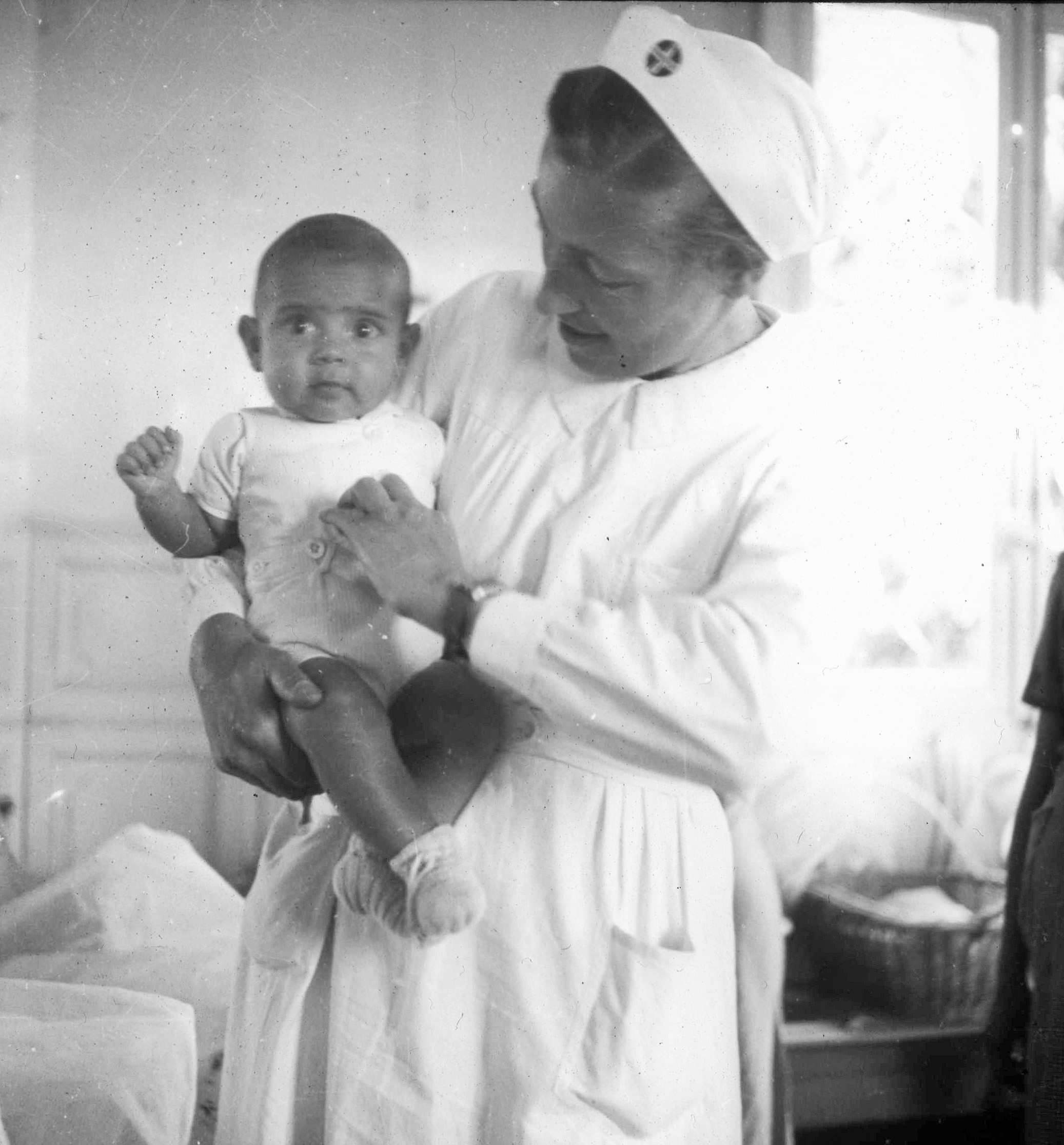 SRK Mitarbeiter Lager Rivesaltes, Frankreich